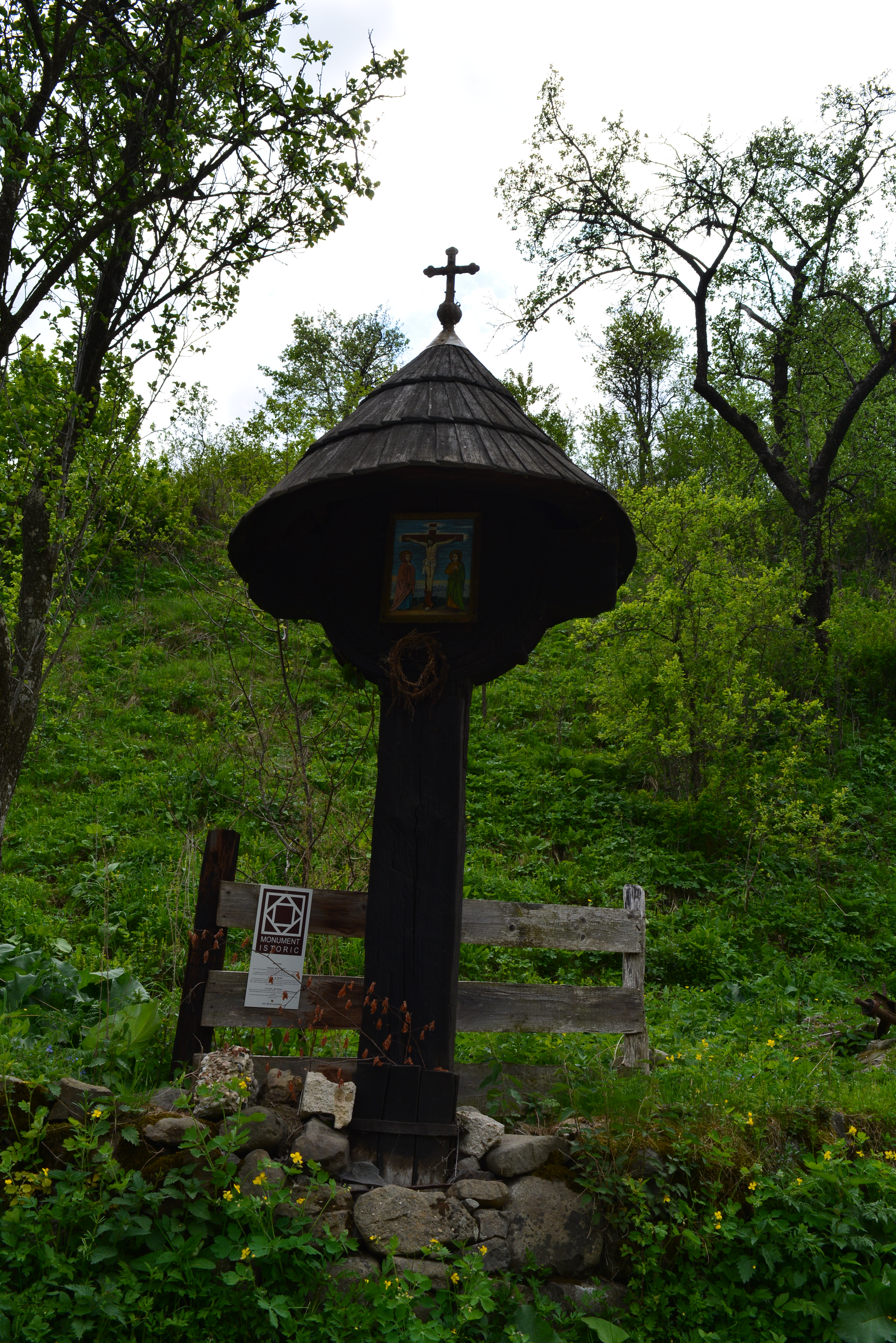 Crucea „de la Țârău”